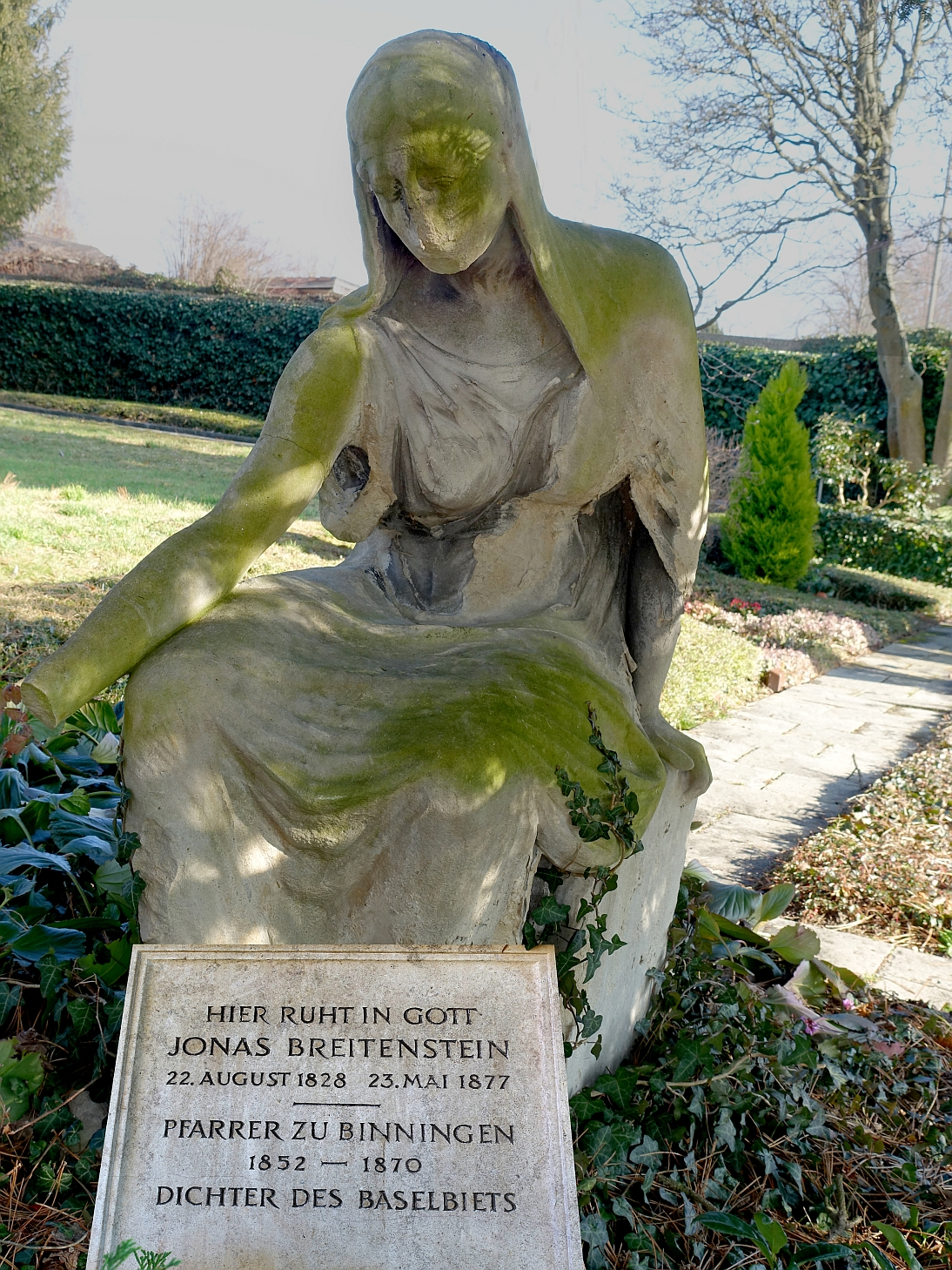 Jonas Breitenstein (1828–1877) Pfarrer, Armenhelfer, Dichter, Schriftsteller. Grab auf dem Sankt Margarethen Friedhof (Nord) in Binningen